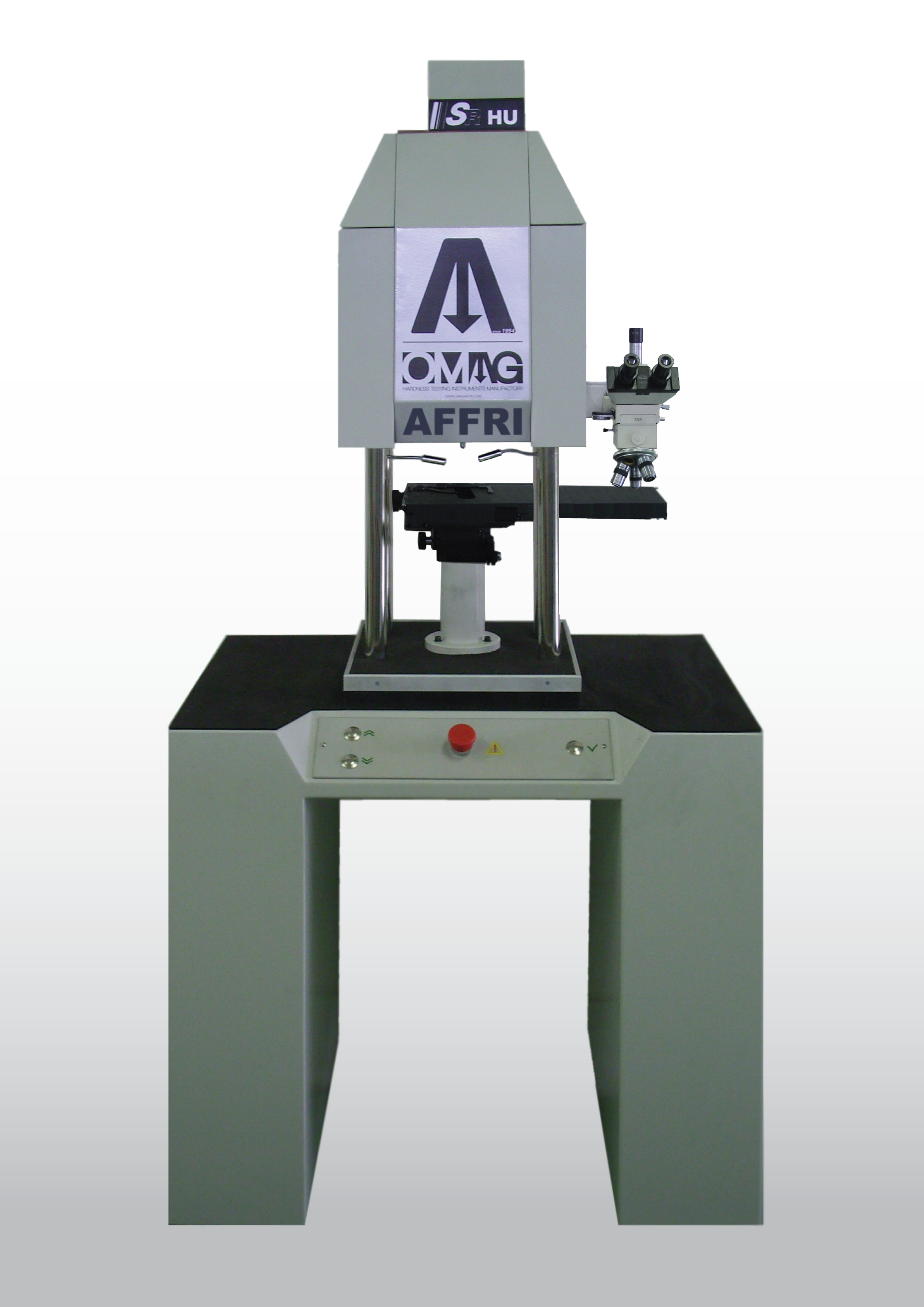 Macchina SRHU09 della ditta OMAGAffri